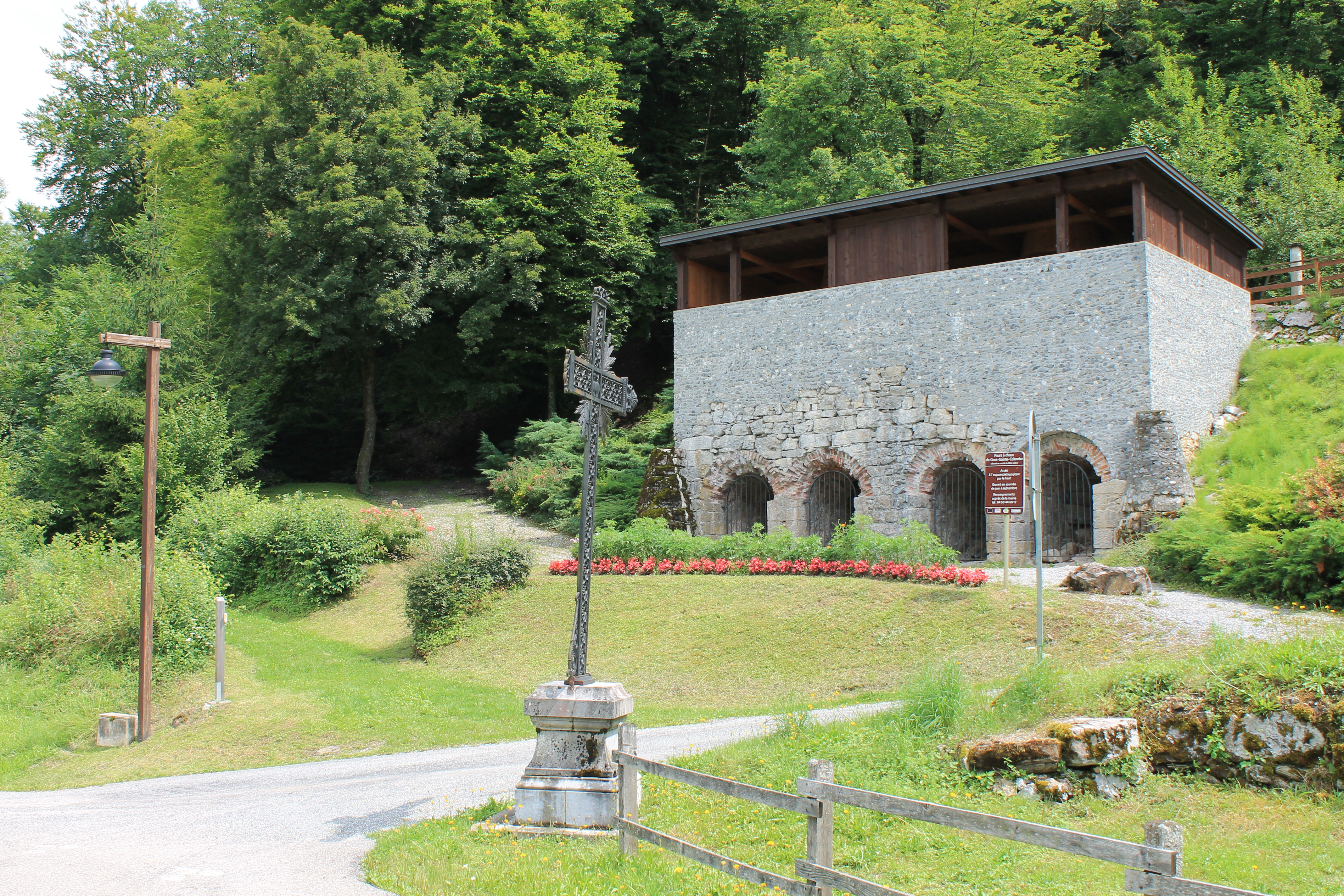 Fours à chaux (XVIII-XIXe siècles) de Cons-Sainte-Colombe rénovés en 2003-2004